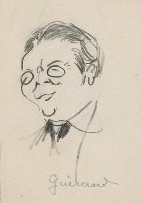 Edmond Guiraud : caricature